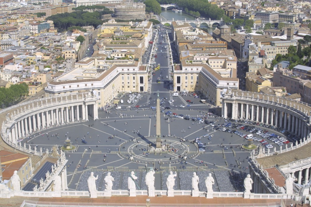 St. Peter Basilic